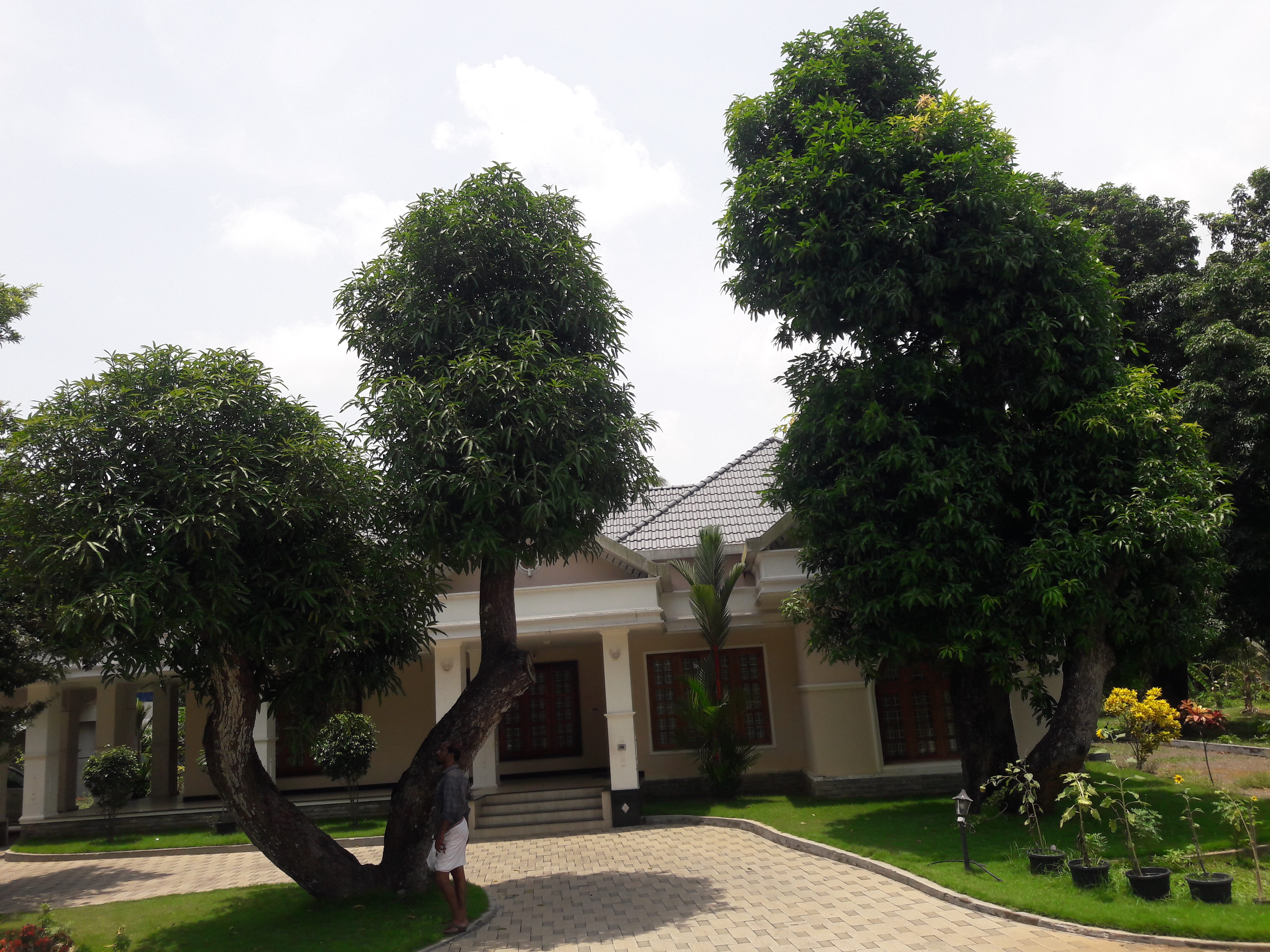 മരങ്ങളിലെ പുനർ യൗവന പ്രക്രിയ ചെയ്ത ശേഷം ഇലകള്‍ വരുന്ന മാവുകള്‍.